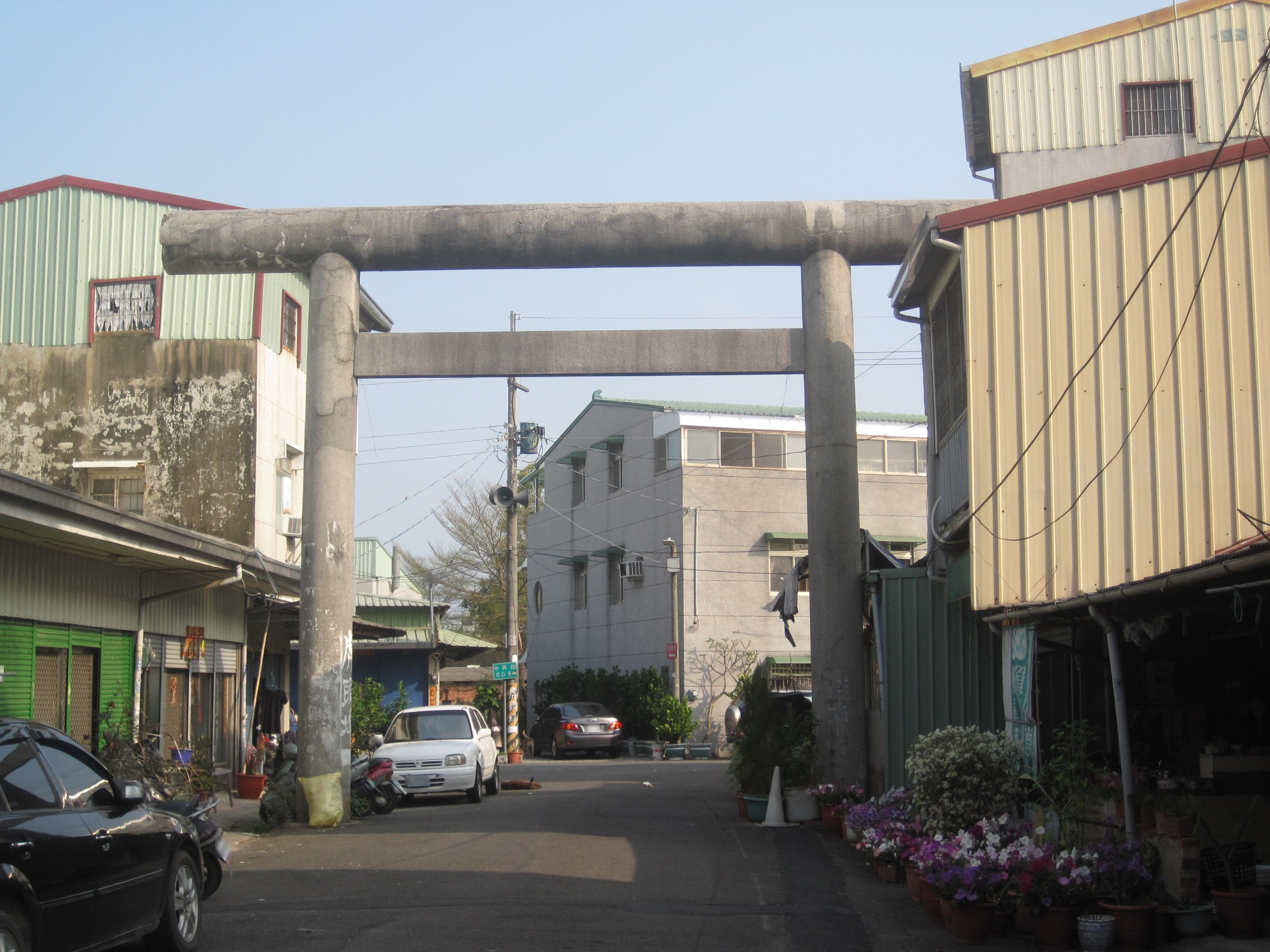 新化神社鳥居